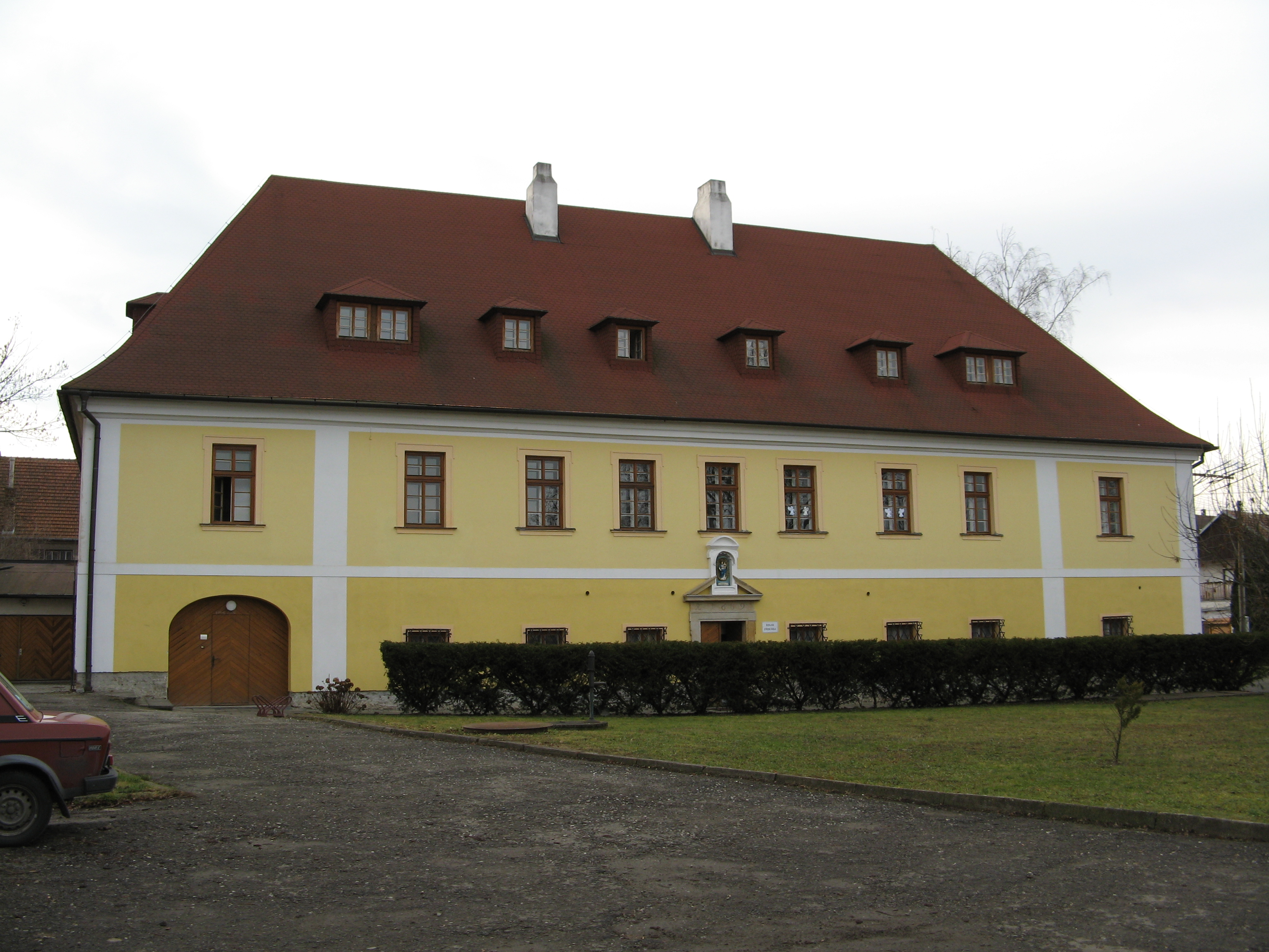 Fara (Vřesovice), Vřesovice 107